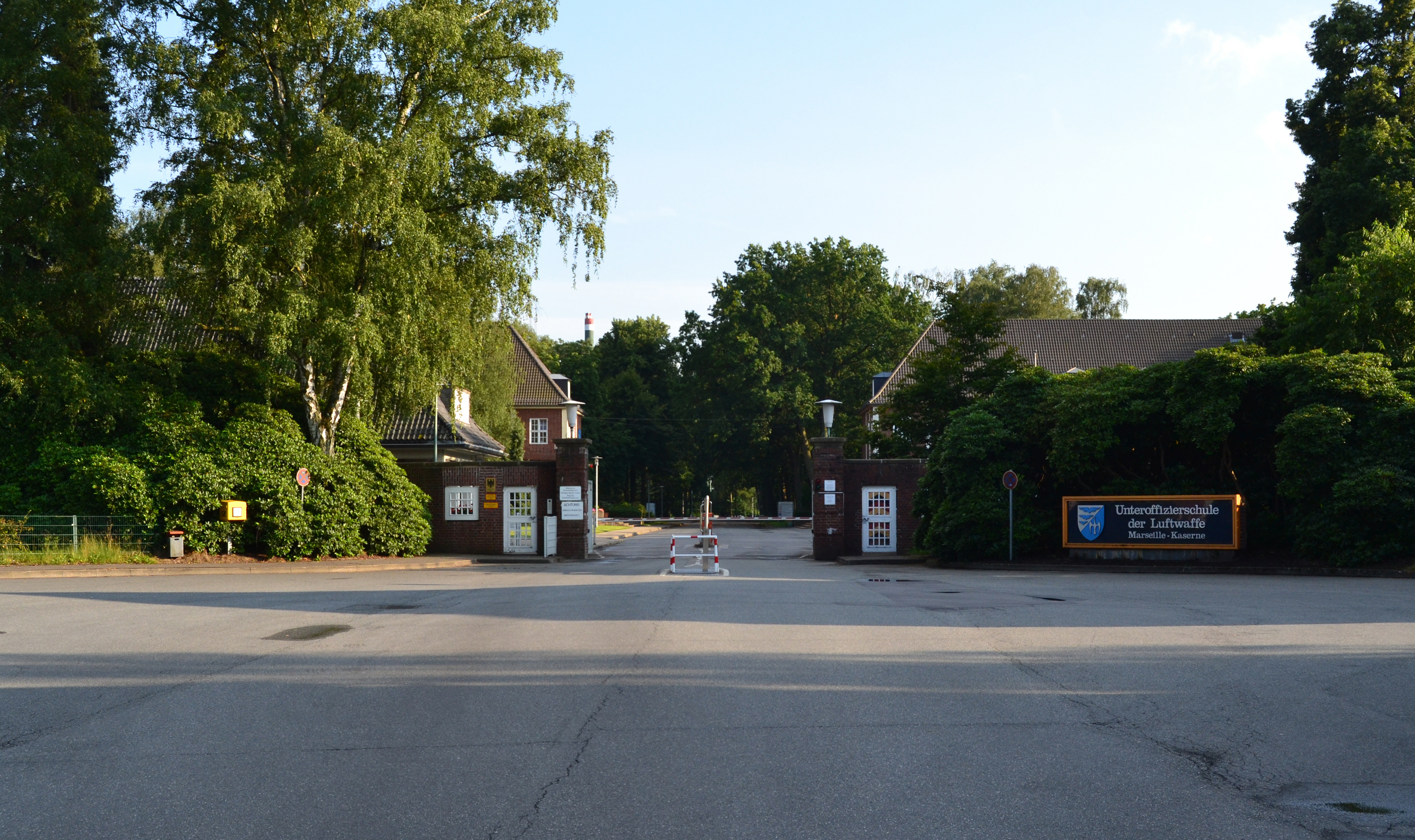 Der Haupteingang der Marseille-Kaserne und der Unteroffizierschule der Luftwaffe (USLw) in Appen, Kreis Pinnebeg